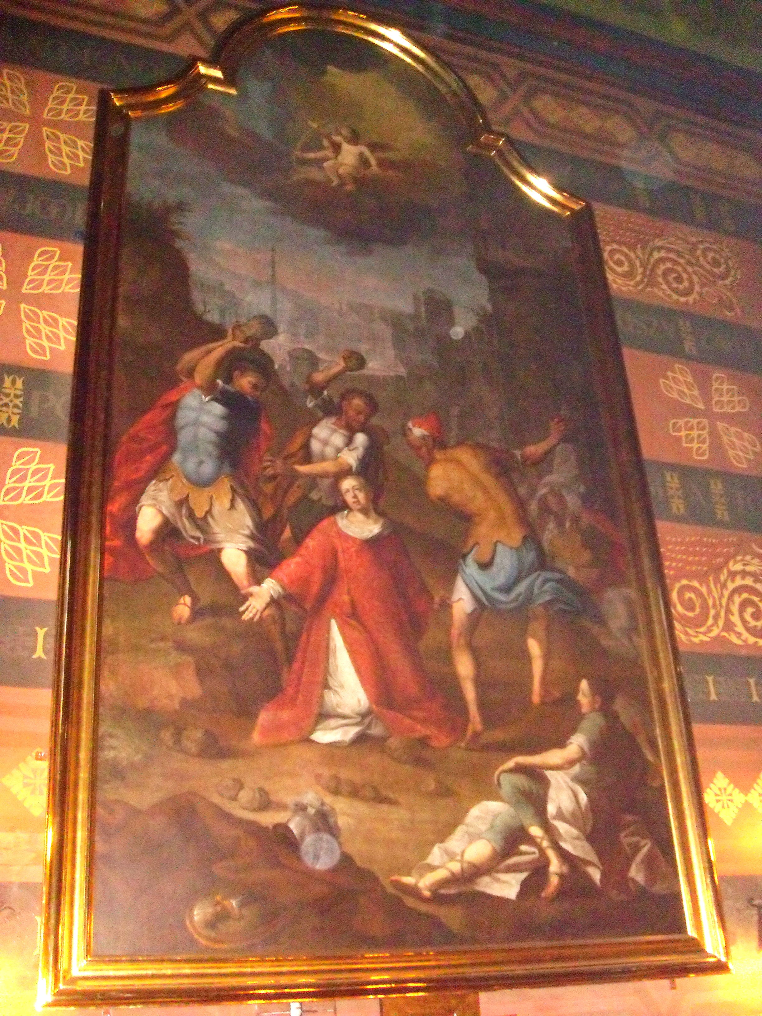 Męczeństwo św. Szczepana - obraz z nieistniejącego kościoła św. Szczepana na Pl. Szczepańskim w Krakowie, kość. św. Szczepana, Kraków, ul. H. Sinkiewicza 19